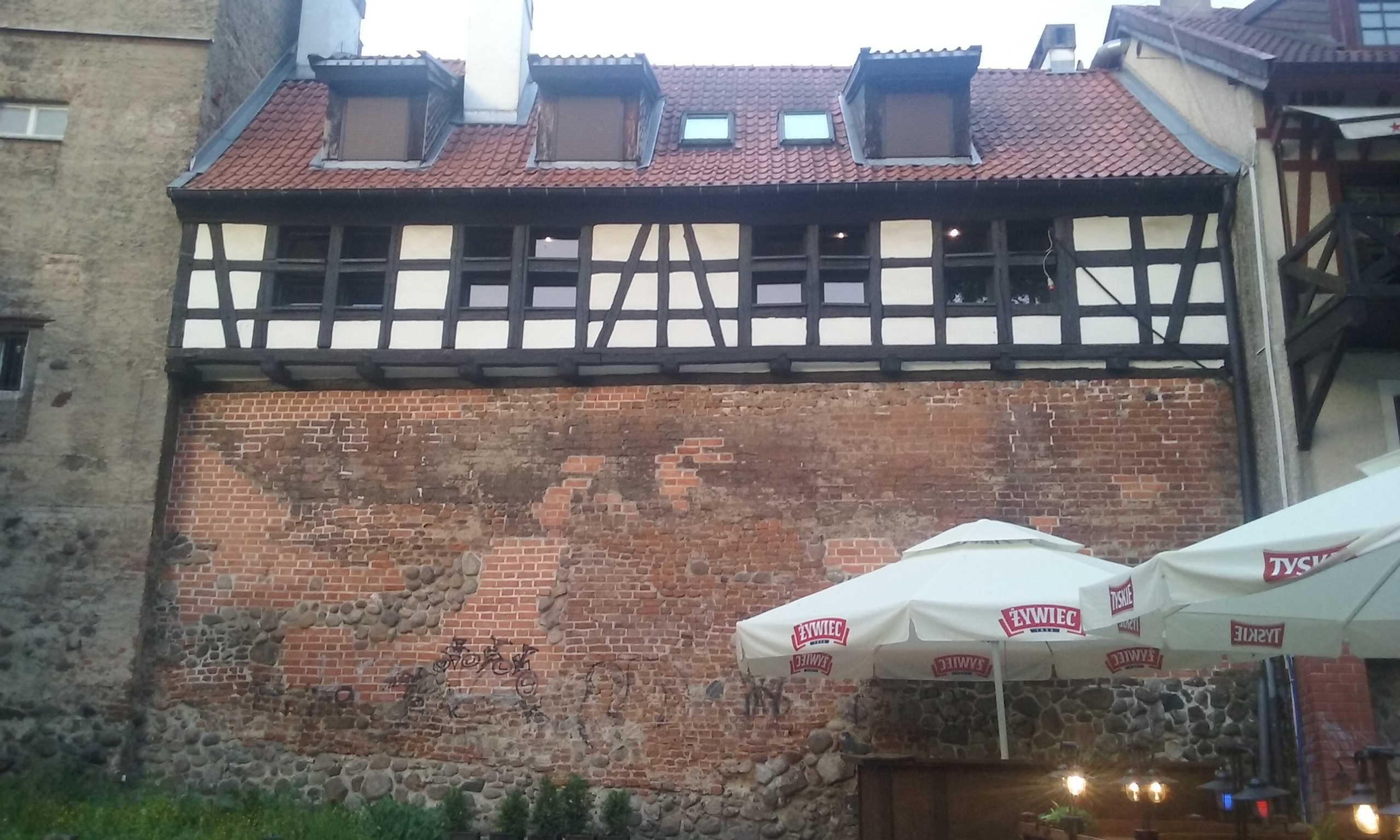 Fragment muru miejskiego w Olsztynie, na którym osadzono spichlerz. Obecnie siedziba SARP przy ul Kołłątaja 14. Widok od strony parku nad Łyną.